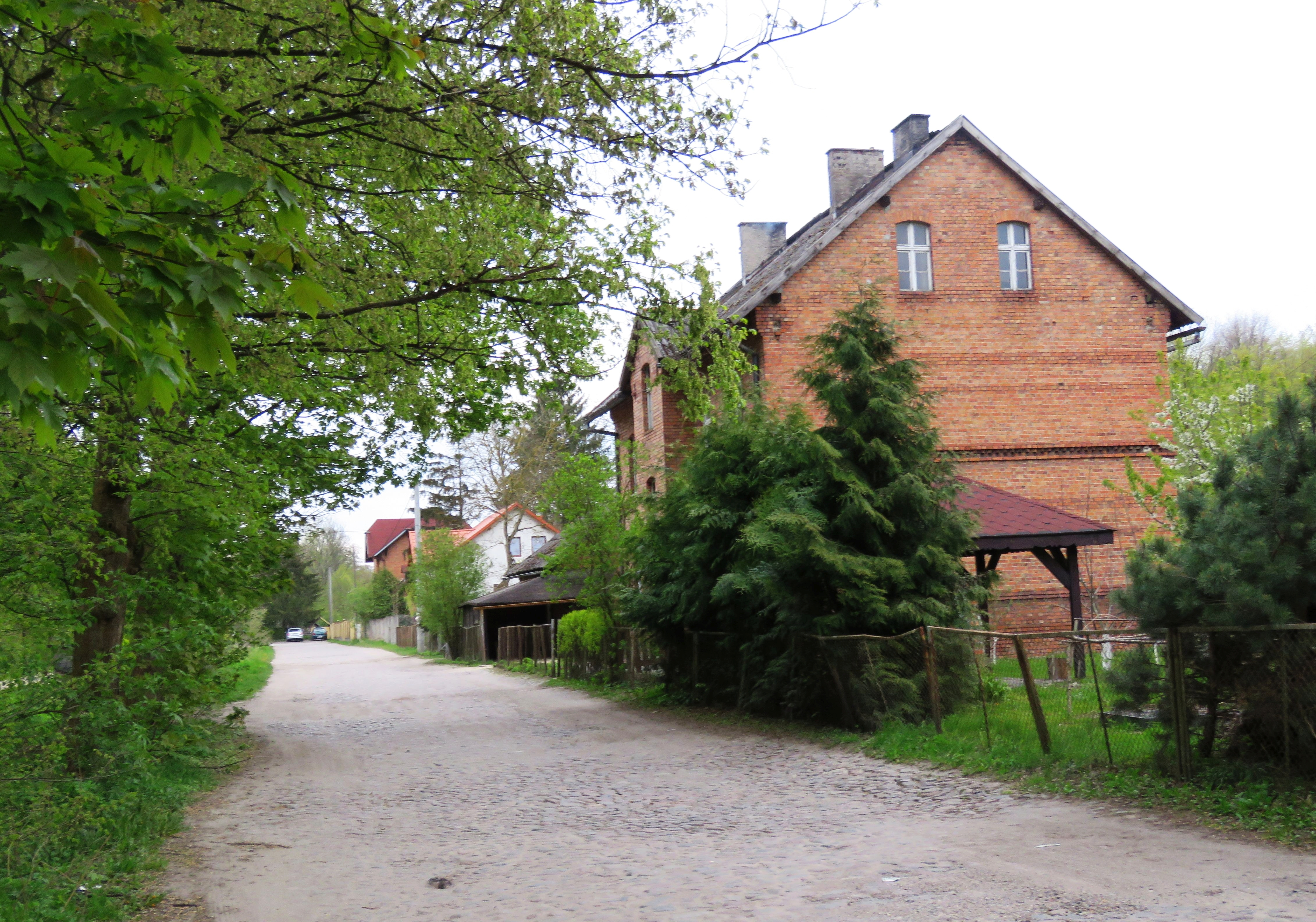 Bartniki, gmina Brodnica